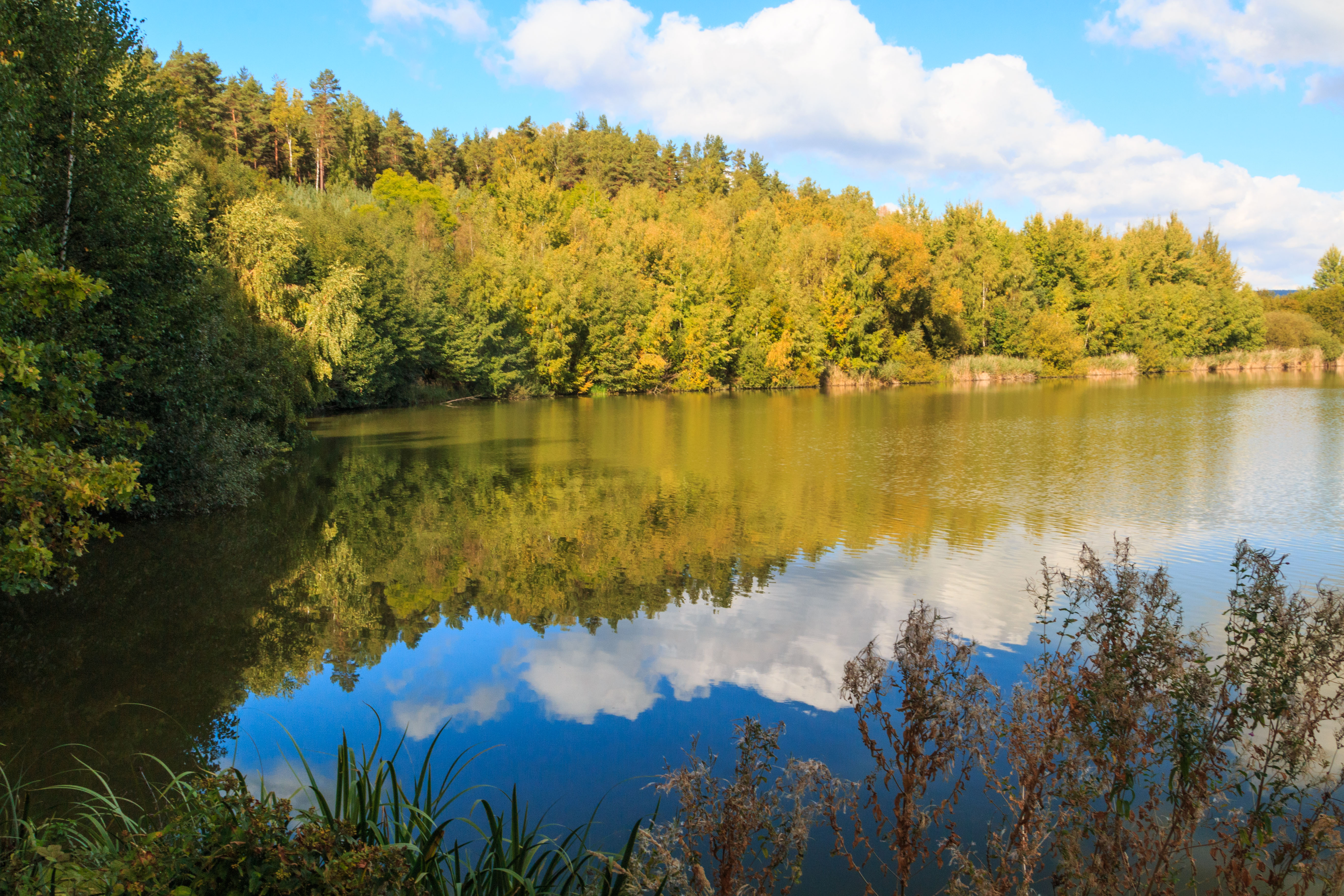 Dolní Kunratický rybník Project: Vodstvo.